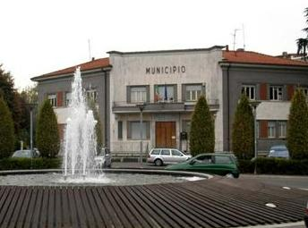 municipio carugo